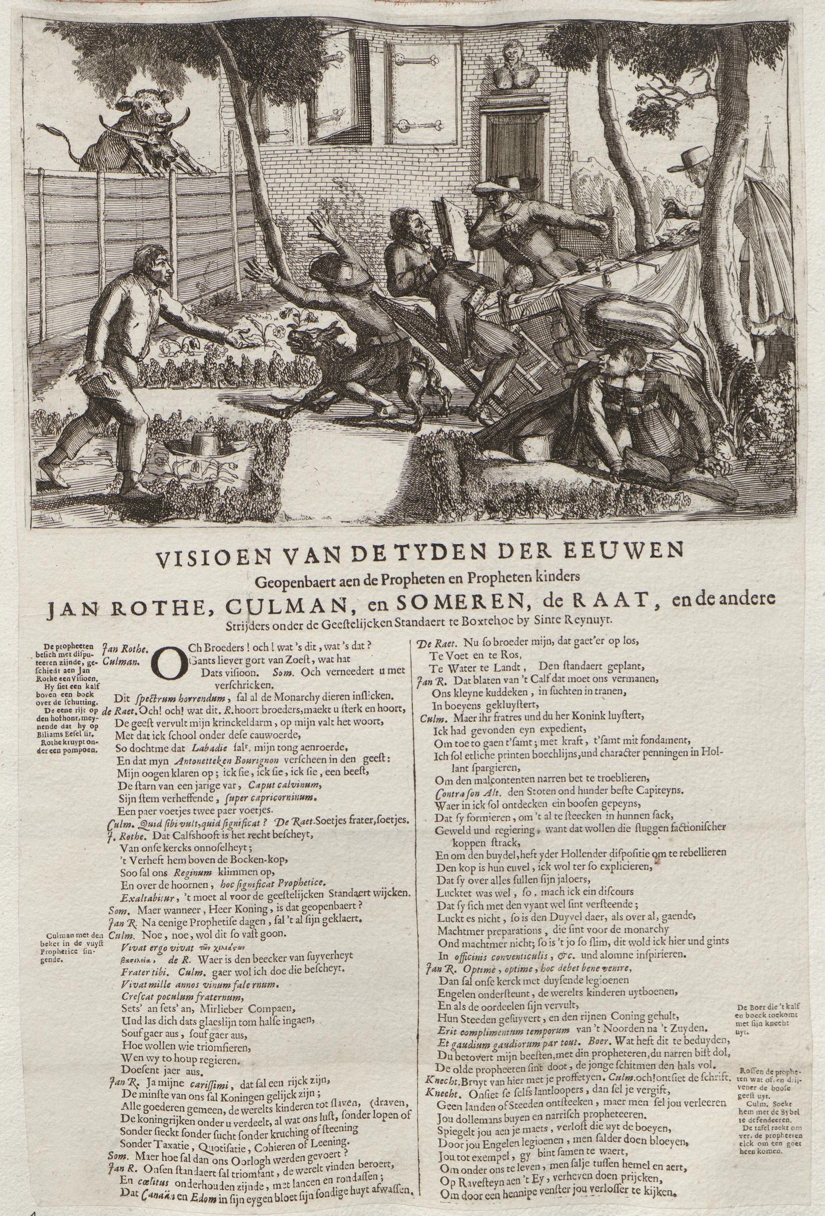 Grafik aus dem Klebeband Nr. 18 der Fürstlich Waldeckschen Hofbibliothek Arolsen Motiv: Spottflugblatt auf Johannes (Jan) Rothe und andere Chiliasten "Visioen van de tyden der eeuwen: Geopenbaert aen de Propheten en propheten kinders Jan Rothe, Culman, en Someren, de raat, en de andere stijders onder de geestelijcken standaert te Boxthoe by Sinte Reynuyt"